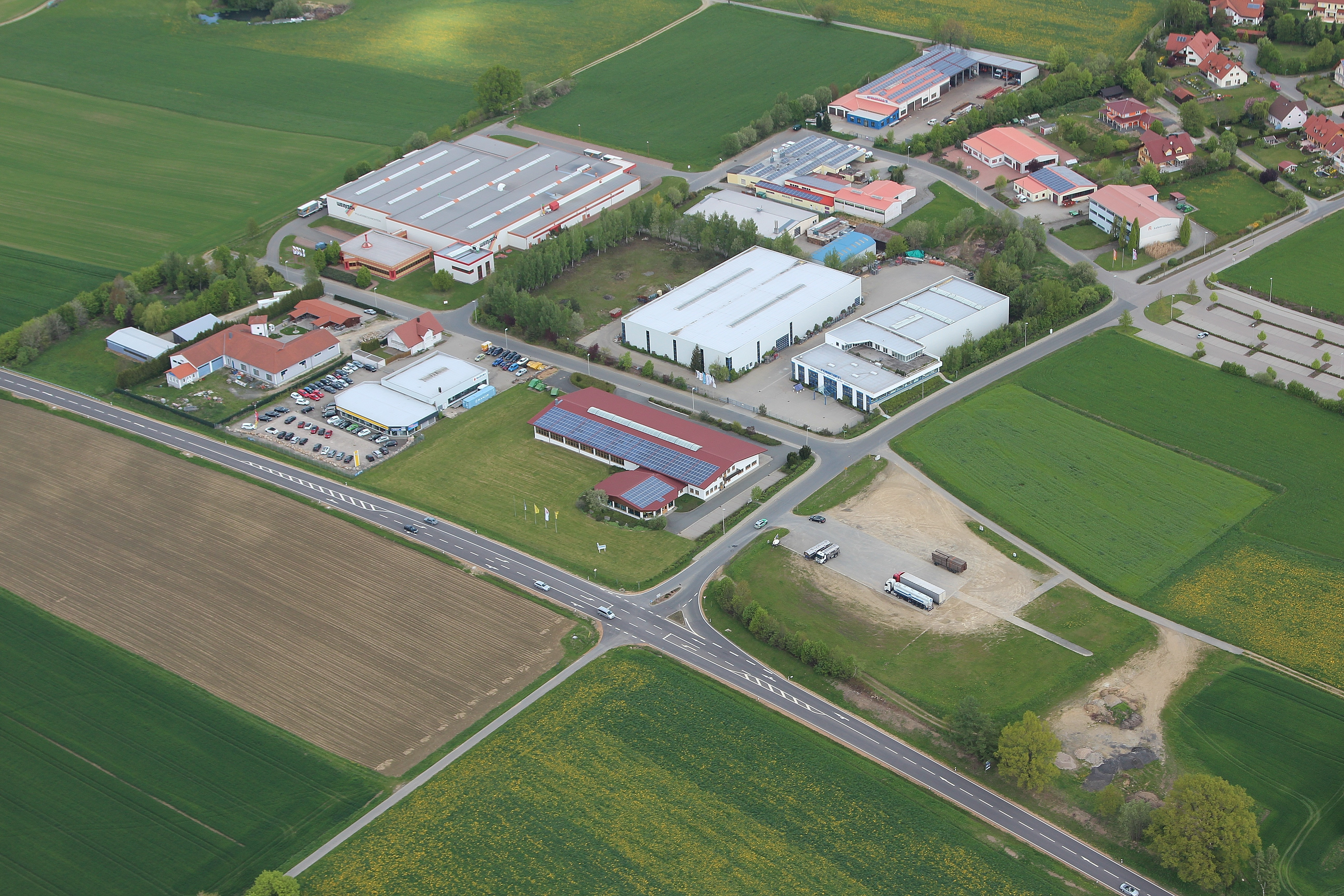 Oberviechtach, Industriegebiet I an der B 22; Landkreis Schwandorf, Oberpfalz, Bayern